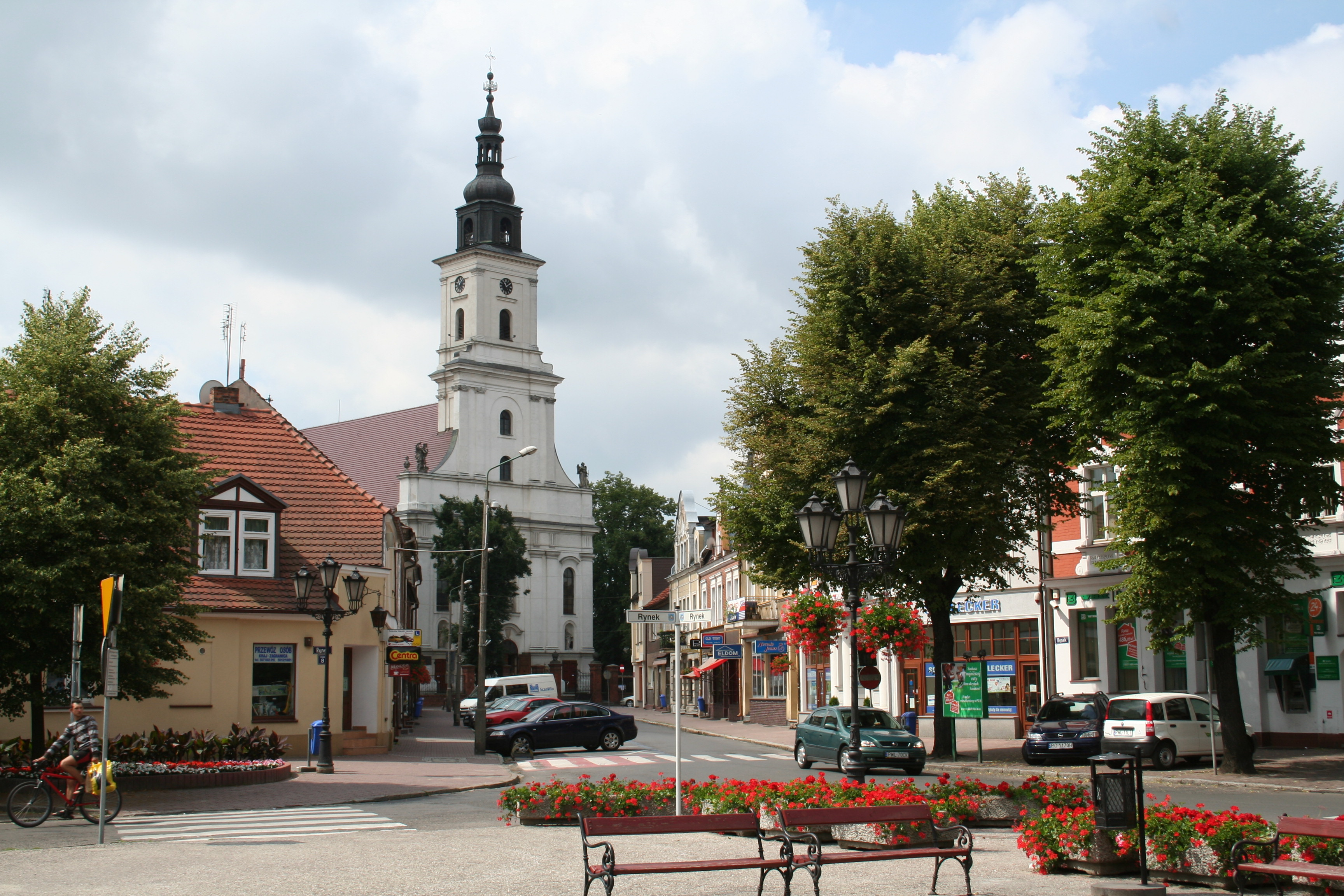 L'église paroissiale